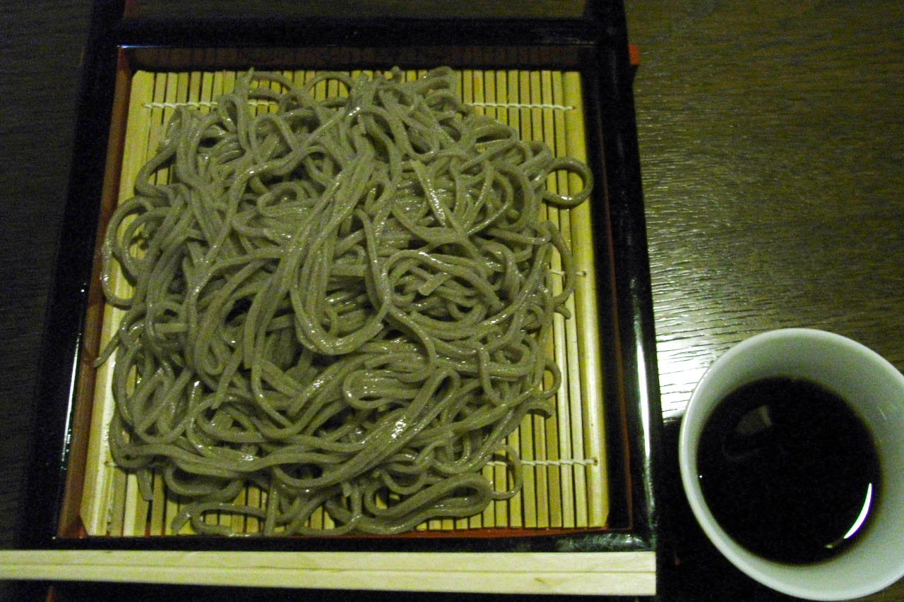 秩父は長瀞の駅前にあるとらやで食べたそば。メインのメニューは盛りそばしかない。なかなか雰囲気のよい店。